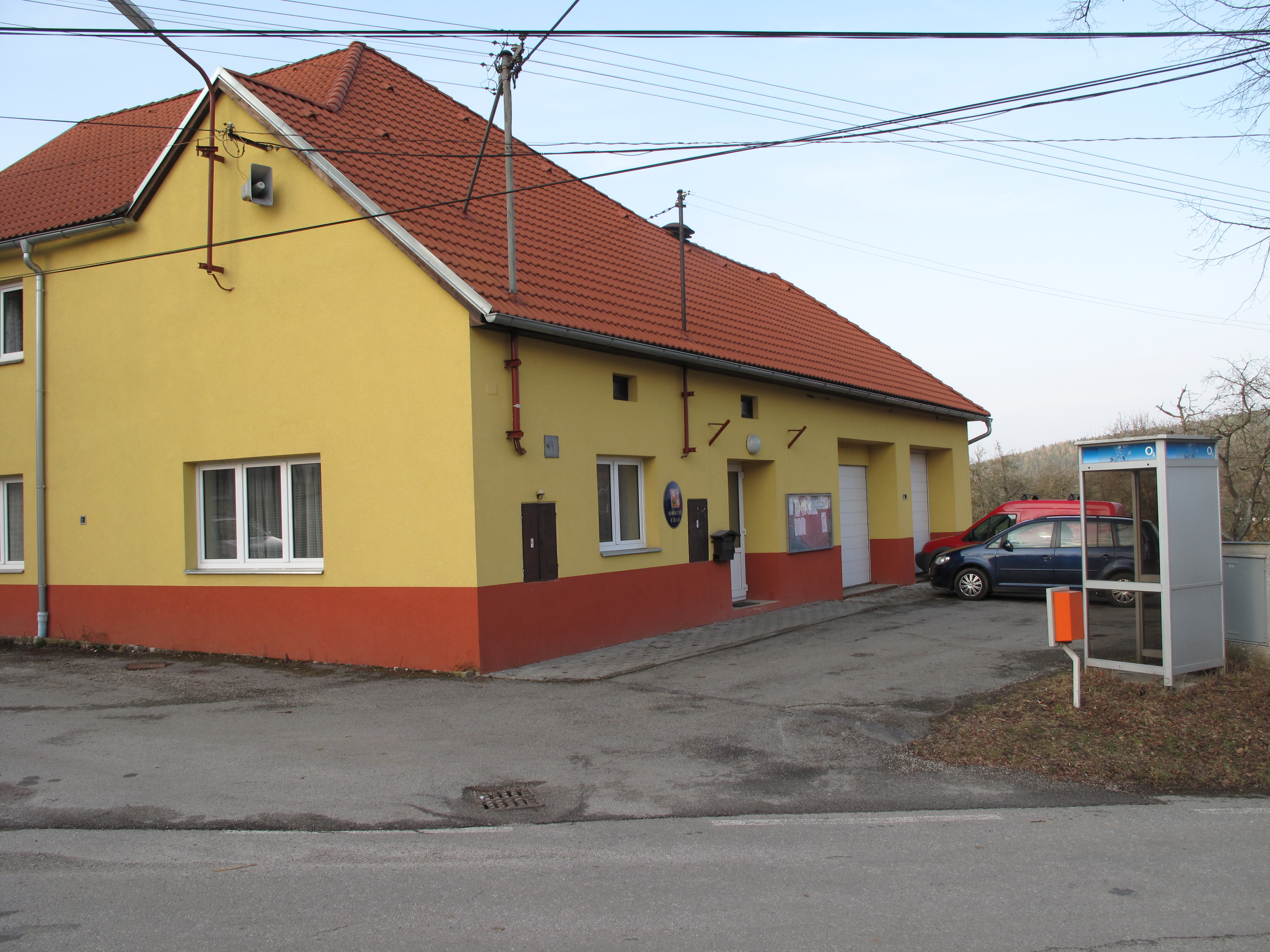 Obecní úřad v Zálezlech. Okres Prachatice, Česká republika.